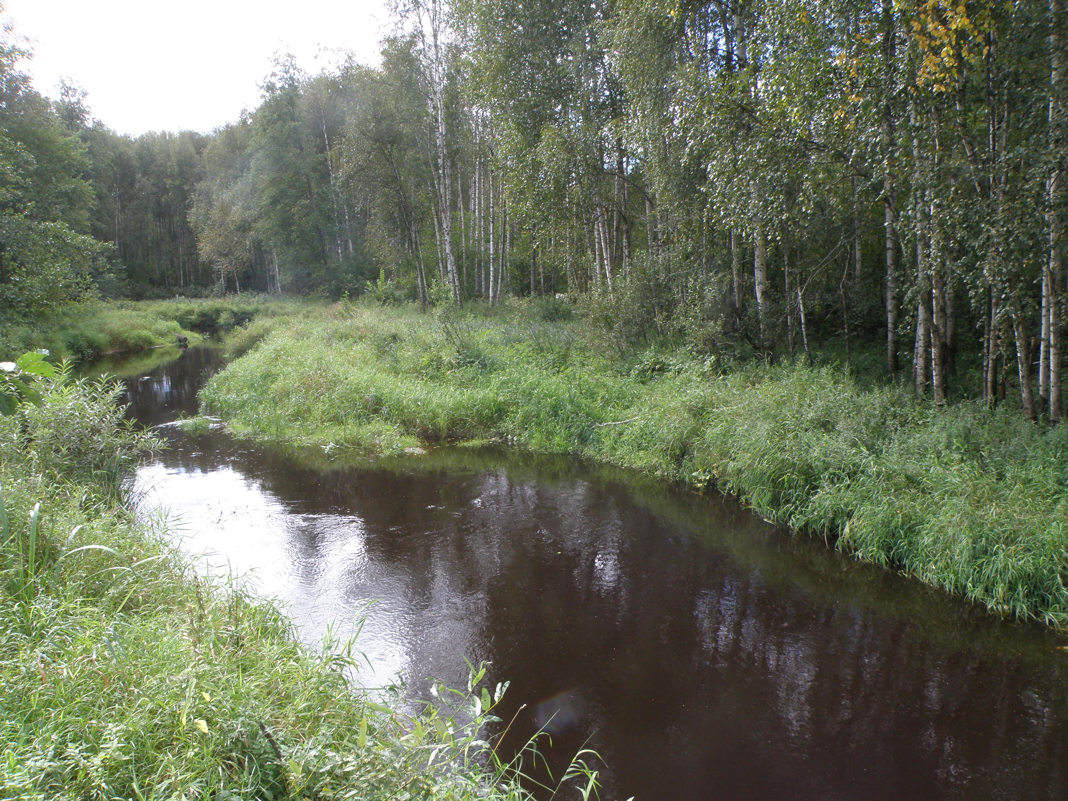 Большая Ушма выше моста у урочища Омуты